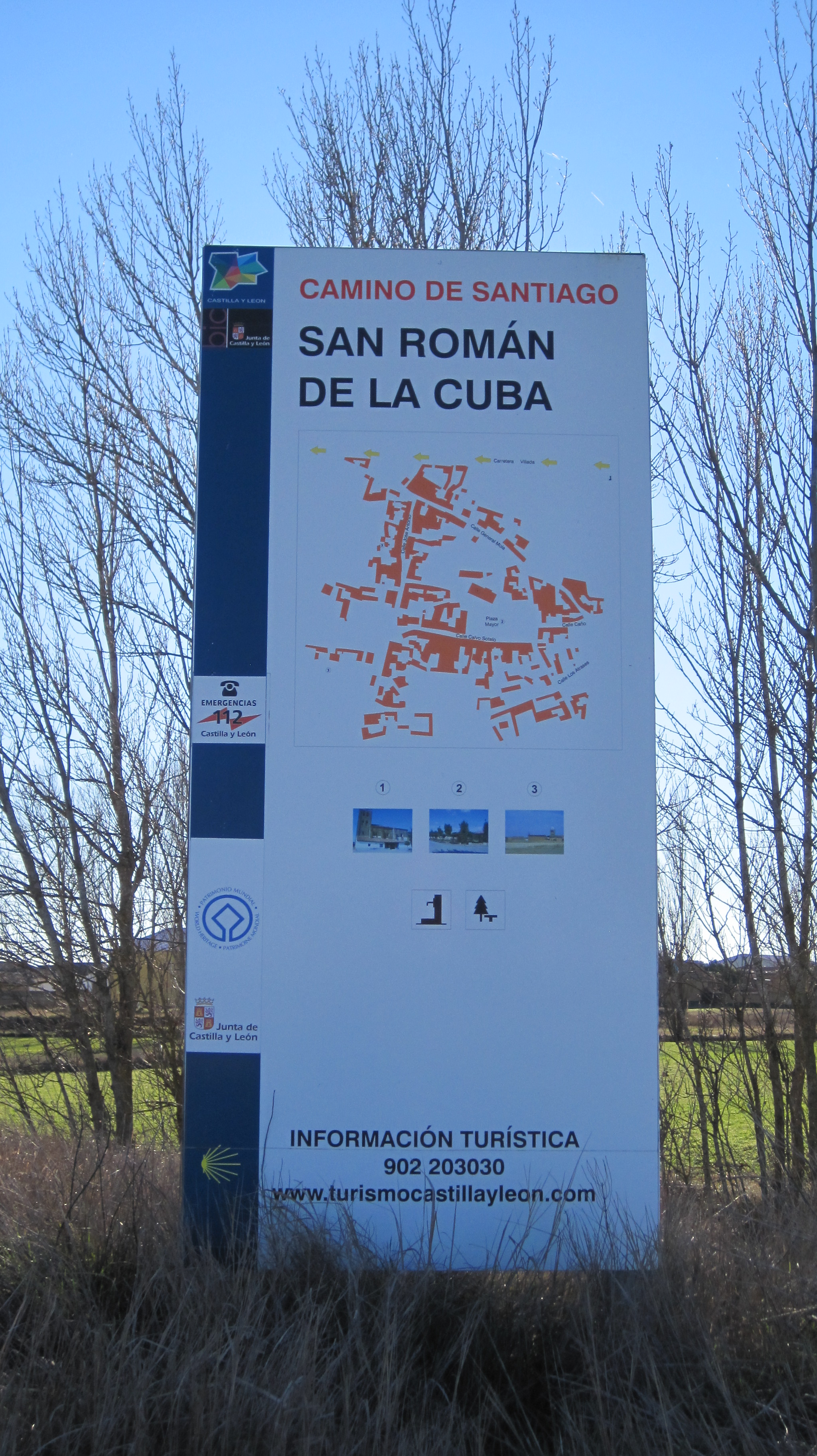 Panel del Camino de Santiago en San Román de la Cuba (Palencia, España).